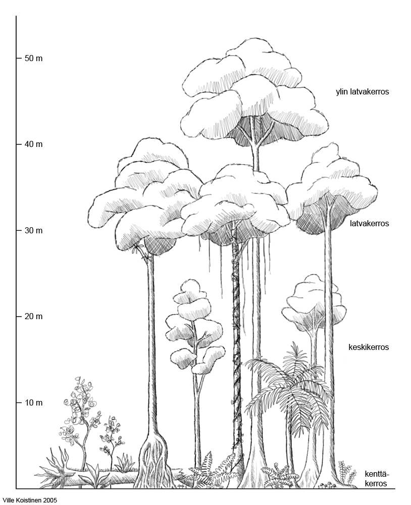 Kaavakuva sademetsän rakenteesta.